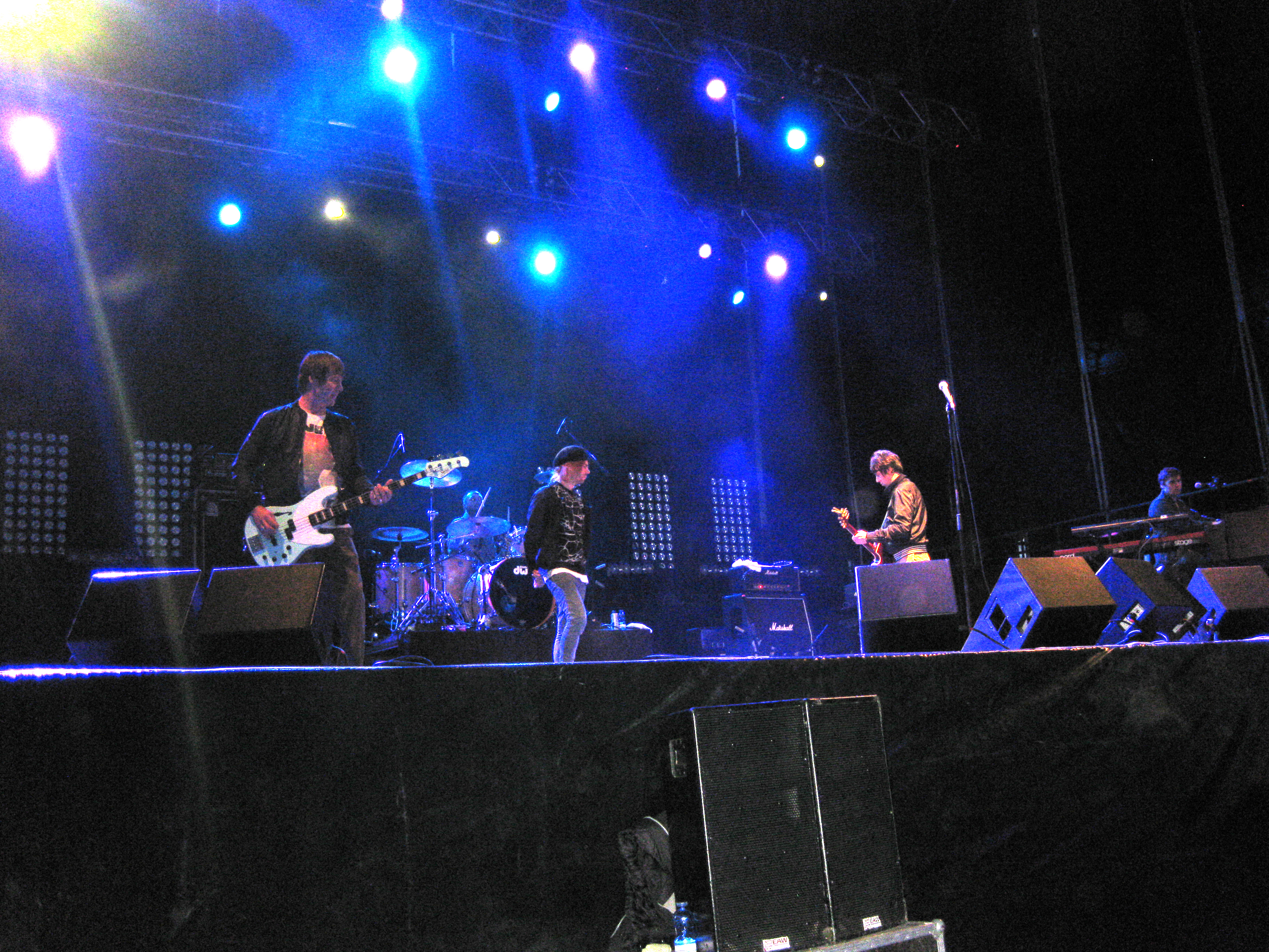 A banda inglesa The Charlatans no festival Rock in Way de Santiago de Compostela.